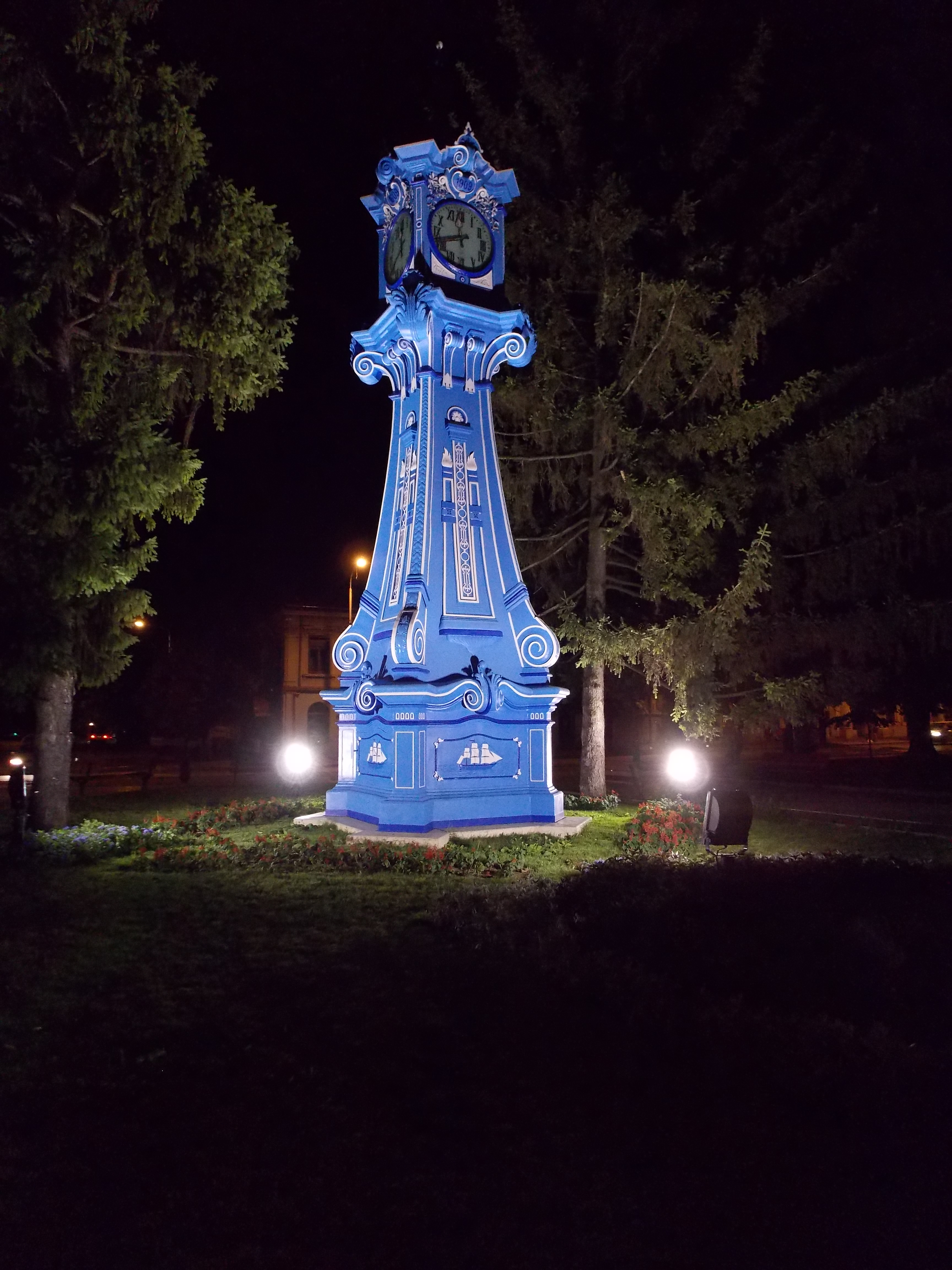 Ceasul din Piata Traian